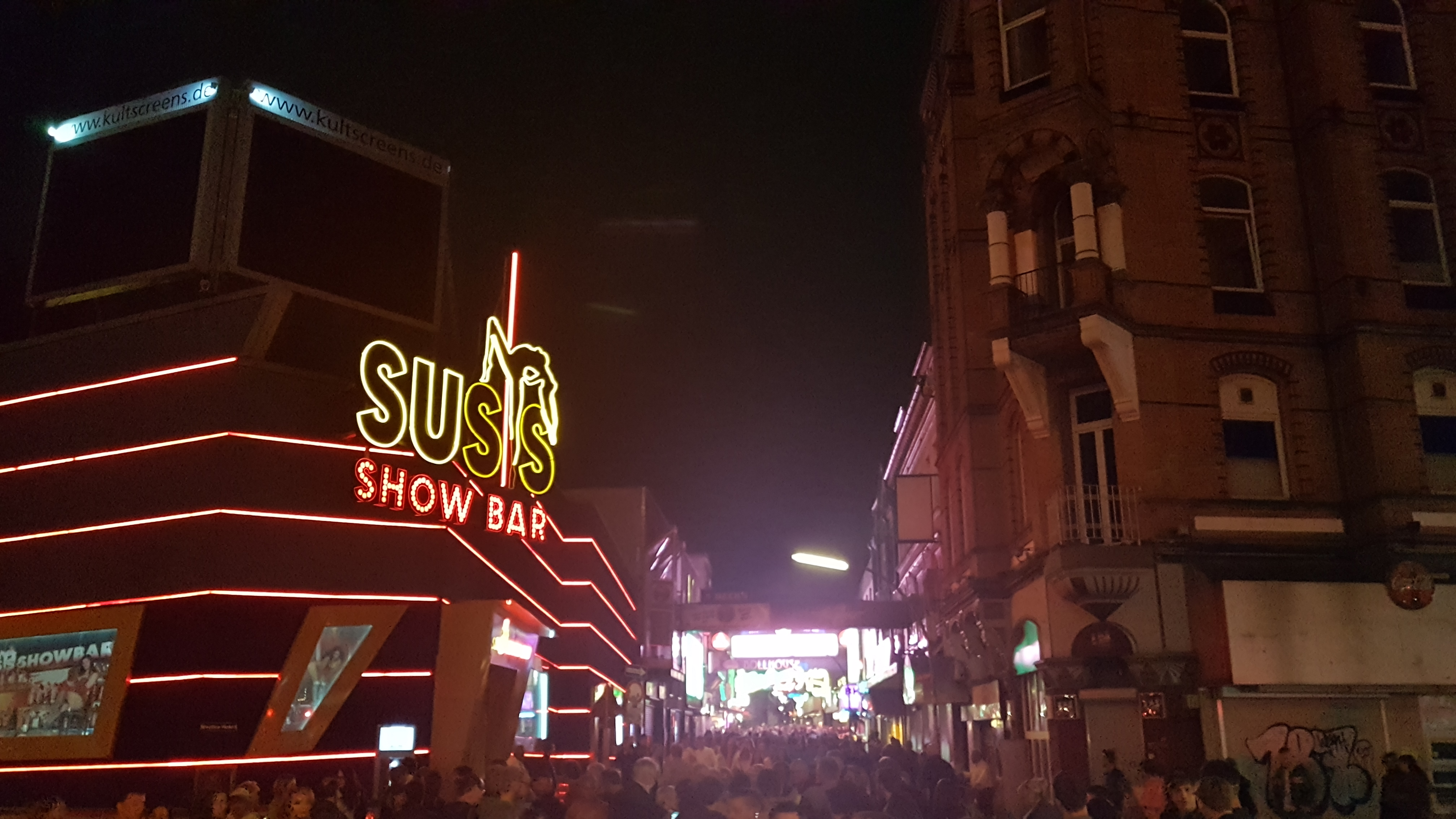 2018-05-11 Reeperbahn des Hamburger Stadtteils St. Pauli bei Nacht